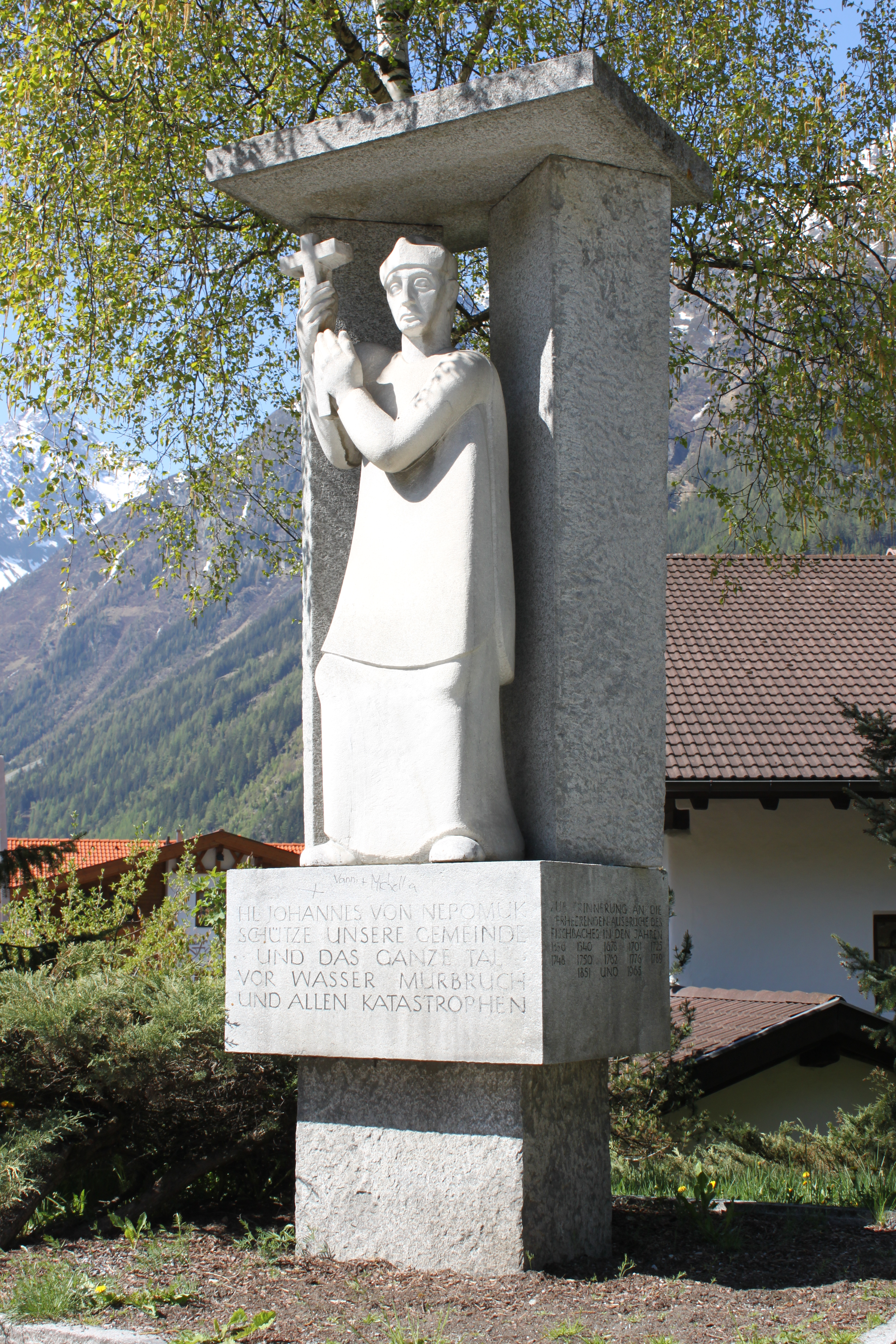 Johannes Nepomuk aus 1969 am Fischbach in Längenfeld vom Bildhauer Erich Keber, bezeichnet E.KEBER.IBK.1969 This media shows the remarkable cultural object in the Austrian state of Tyrol listed by the Tyrolean Art Cadastre with the ID 20554. (on tirisMaps, on tirisdienste.at, pdf, more images on Commons)